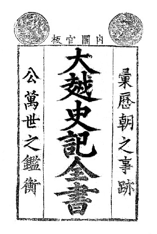 The first page of the Đại Việt sử ký toàn thư